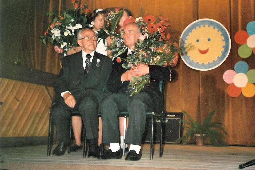 Wręczenie Orderu Uśmiechu. Pierwszy od Lewej Franciszek Jaroszewski.